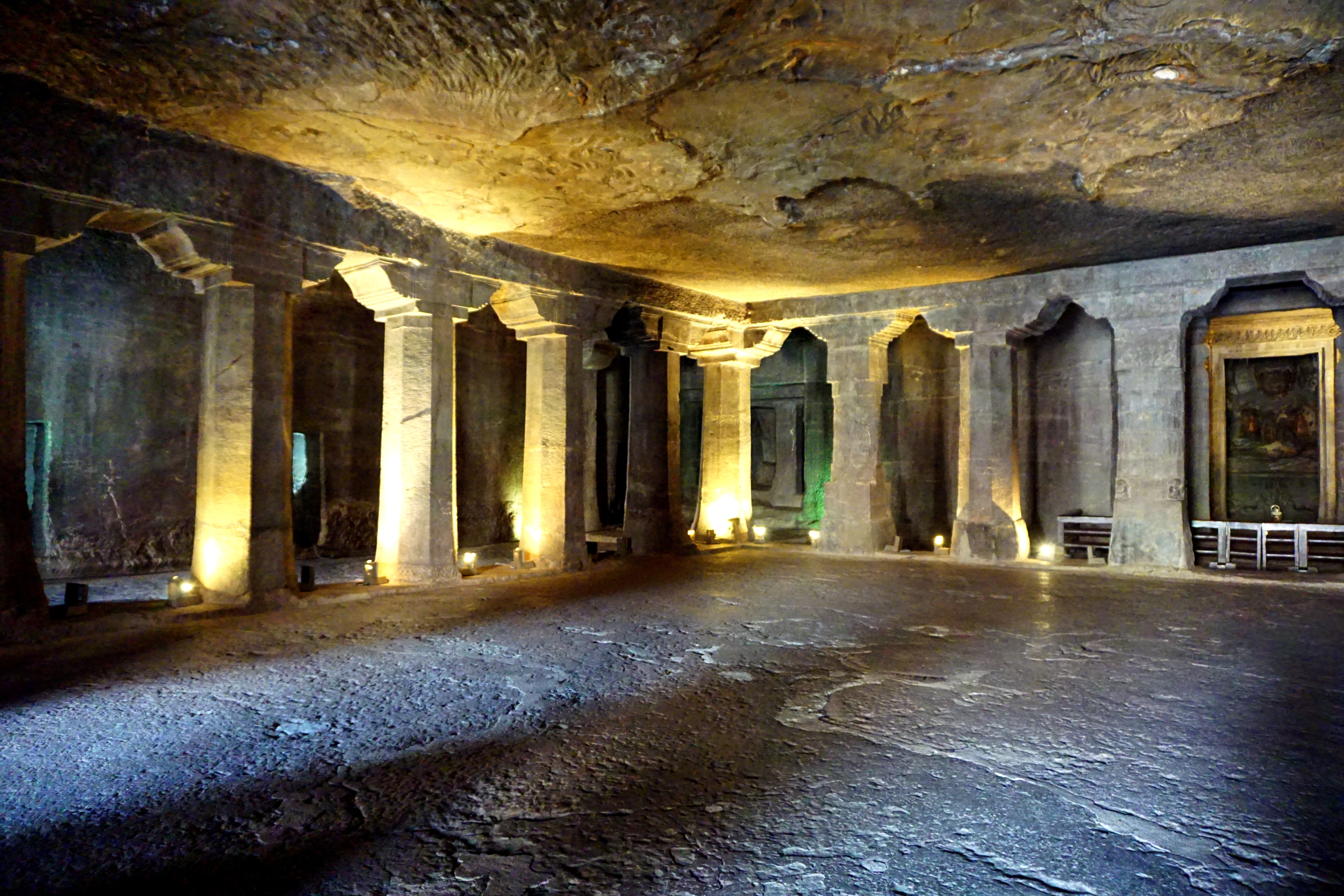 Ajanta Caves, Aurangabad, India